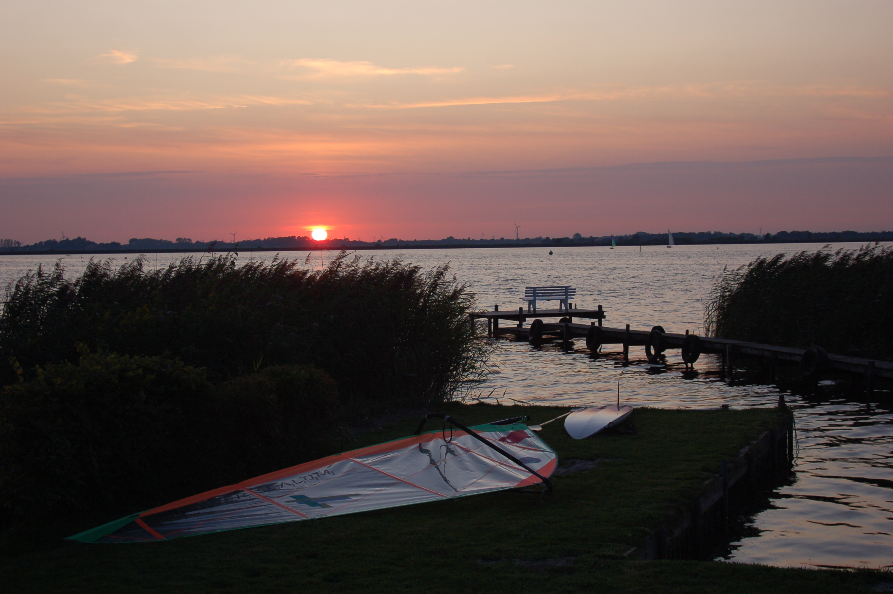 Kleines Meer (auch Hieve genannt); Blick von Südost